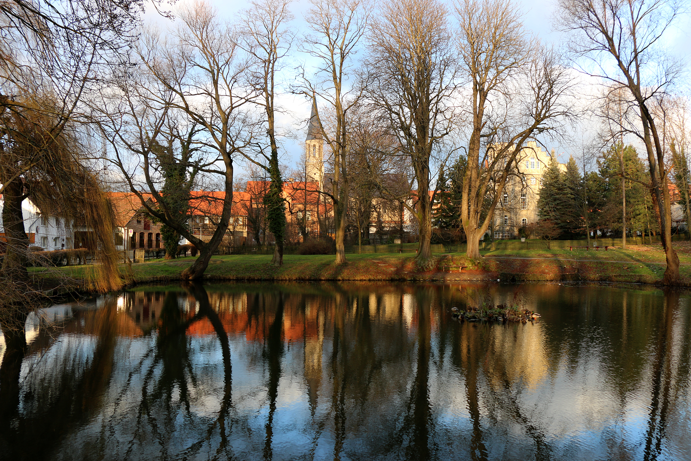 Teich im Park von Dardesheim, Landkreis Harz